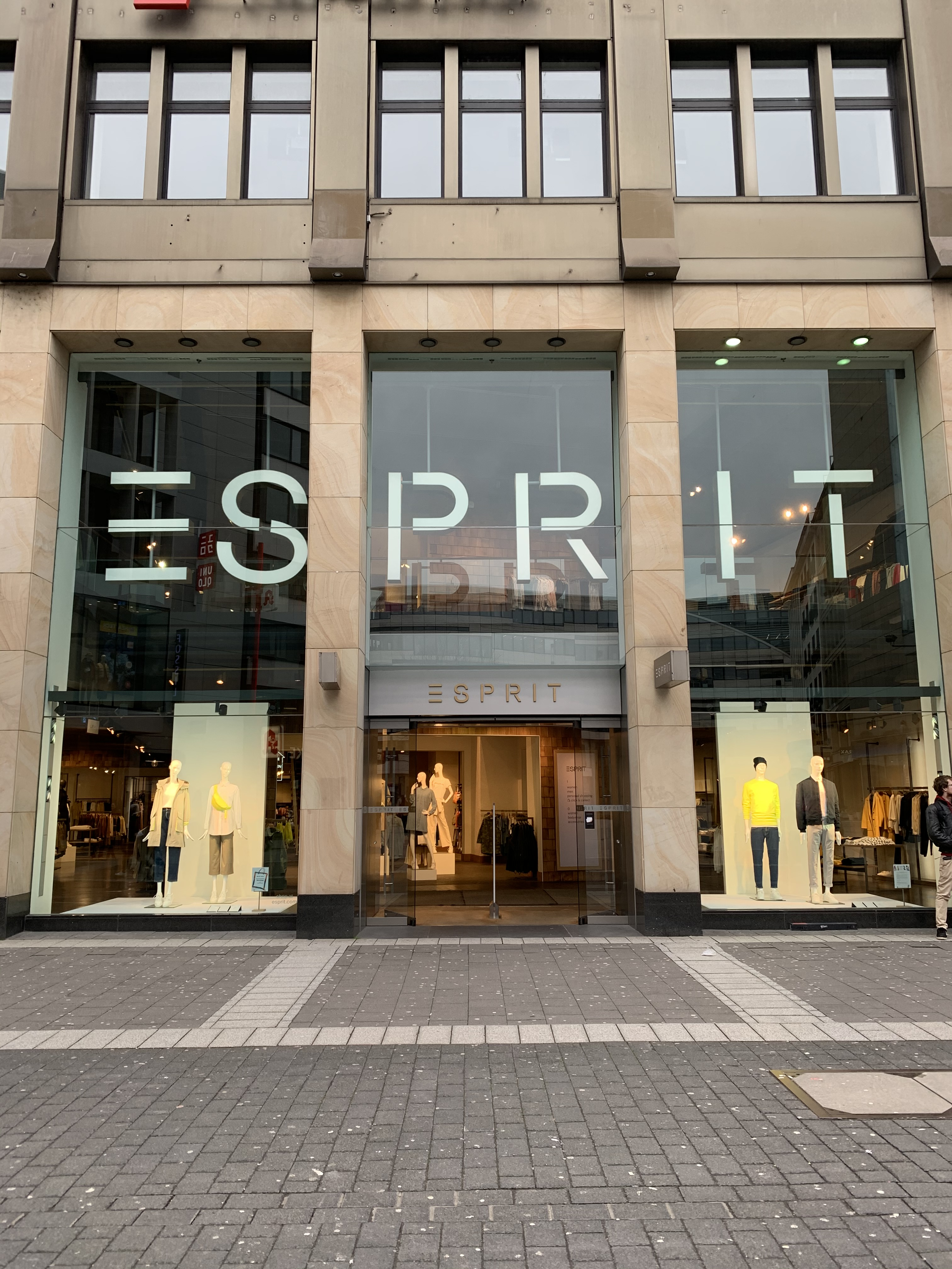 Esprit-Store in Düsseldorf